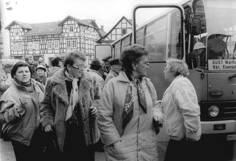 ADN-ZB-Hirndorf-17.11.89-BRD: Grenzverkehr-Mit dem bevorstehenden Wochenende werden in Eisenach und Herleshausen durch den VEB Kraftverkehr im regelmäßigen Pendelverkehr verbunden. Schon seit Tagen nutzen viele DDR-Bürger die Möglichkeit eines Ausfluges in die nahegelegene Nachbargemeinde.